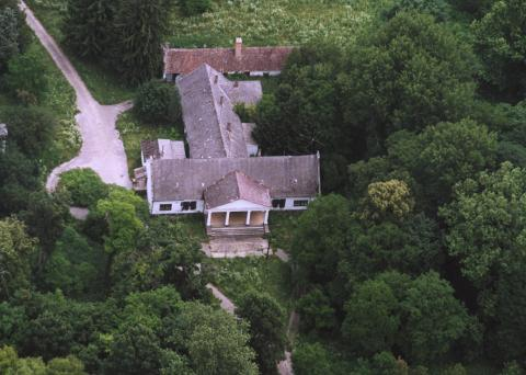 Magyartelek, Hungary, aerialphotography